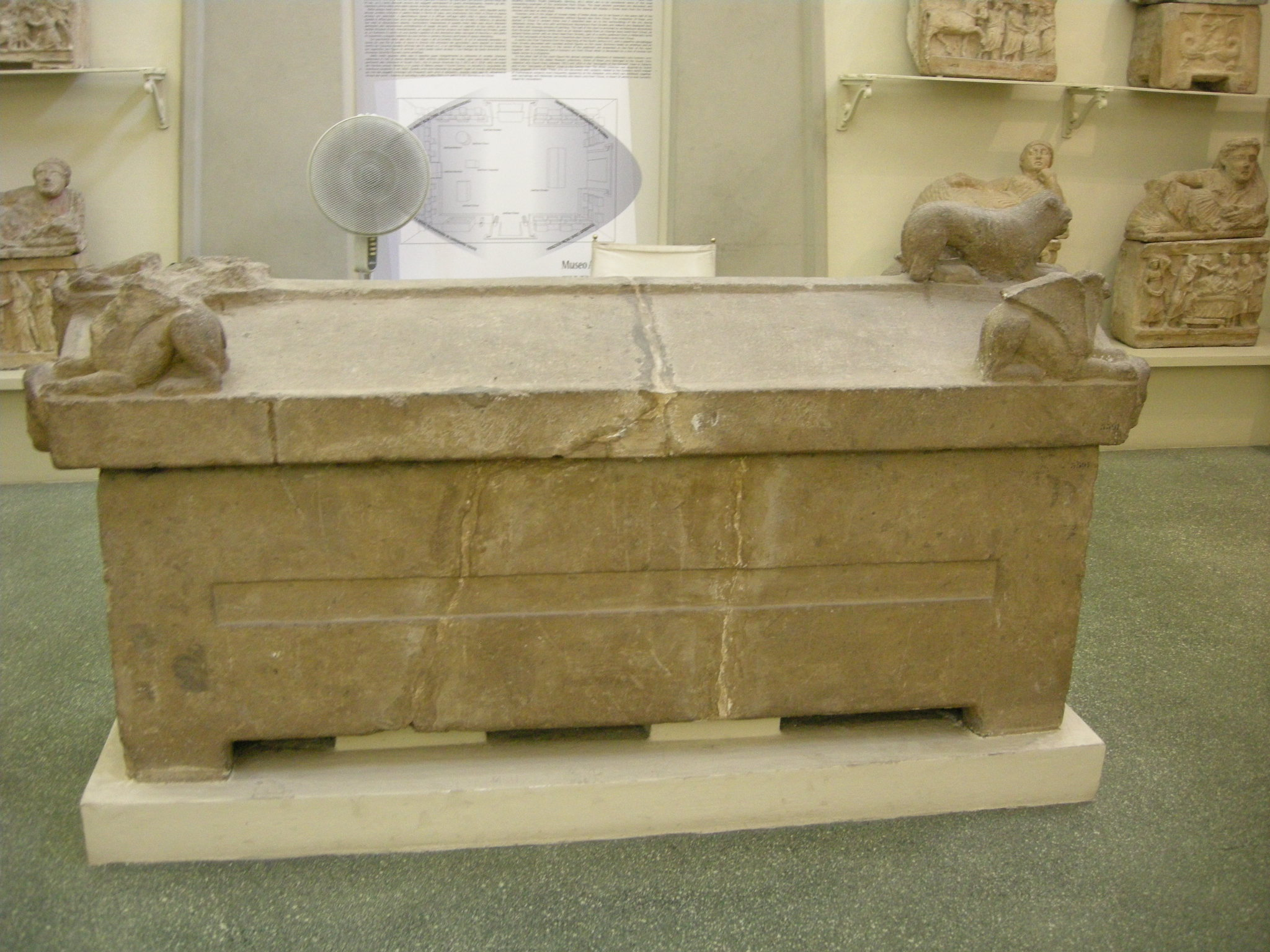 Sarcofago etrusco in peperino da Orvieto, IV secolo AC. Museo archeologico di Firenze.